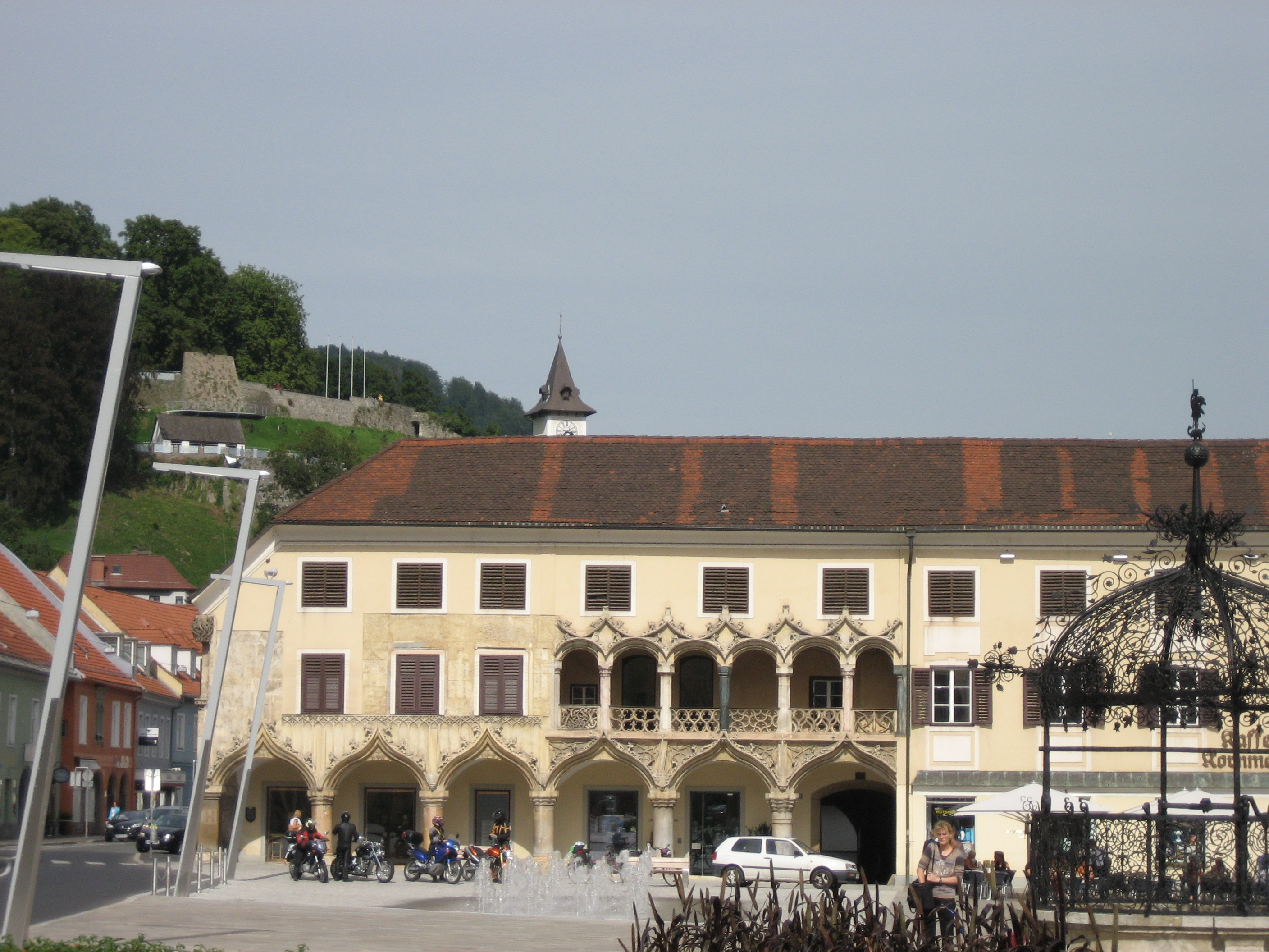 Bruck an der Mur (Austria): Hauptplatz mit Kornmesserhaus, eisernem Brunnen und Schlossberg mit Uhrturm